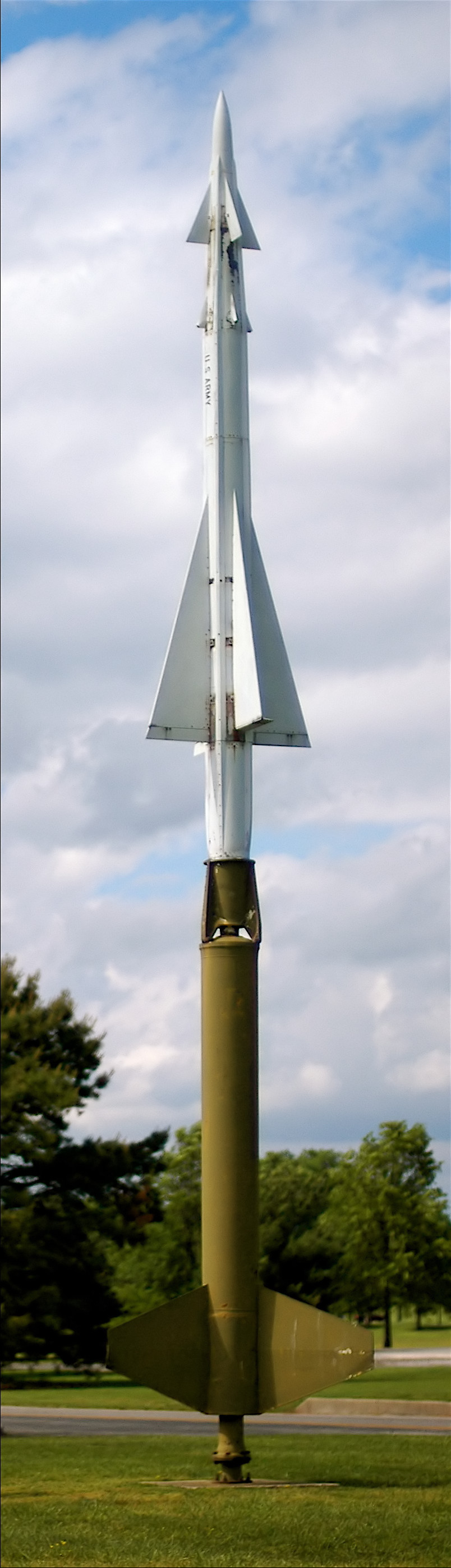 Rakieta przeciwlotnicza Nike-Ajax wystawiany w Fort Meade Museum.